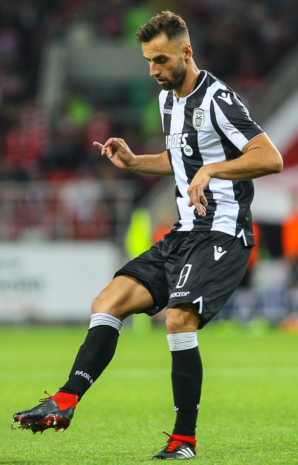 «Спартак» вылетел из Лиги чемпионов